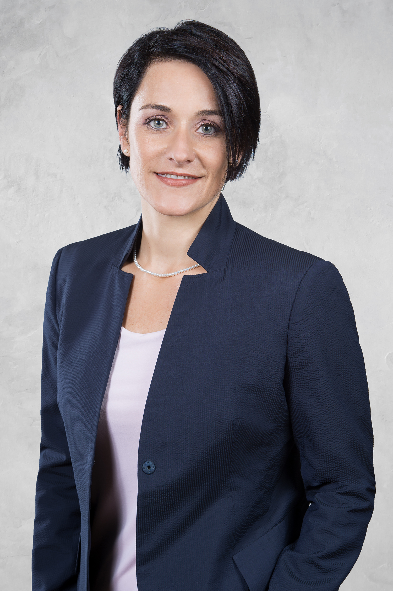 Isabel Schorer (2019)